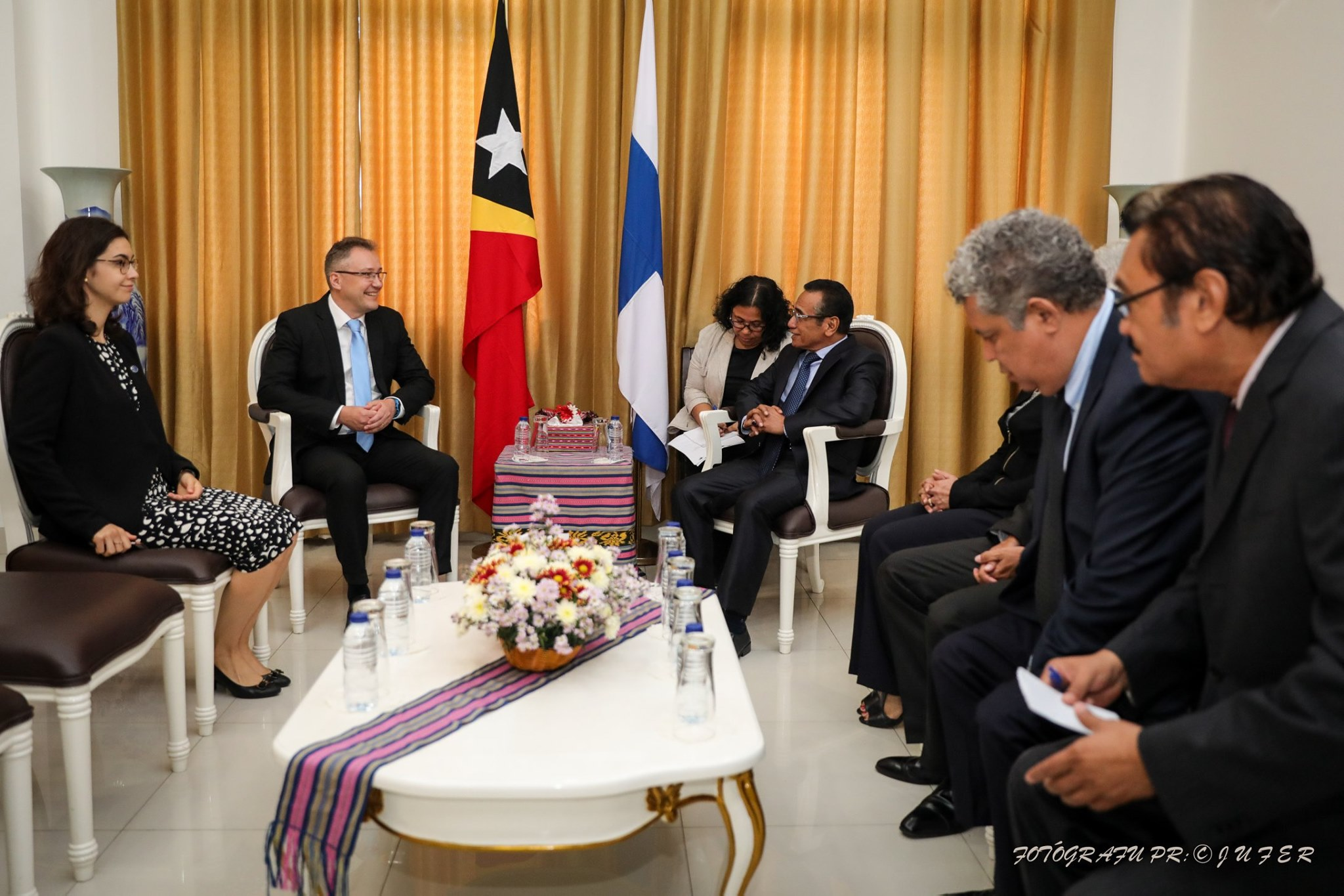 Präsident Francisco Guterres nimmt die Akkreditierung der neuen Botschafter in Osttimor entgegen: Finnland: Jari Sinkari Vereinigtes Königreich: Owen John Jenkins Polen: Beata Stoczynski Tetun: Prezidente Repúblika Francisco Guterres Lú Olo, ohin, simu karta kredensiál husi Embaixadór Finlandia, Jari Sinkari, Embaixadór Reinu Unidu, Owen John Jenkins, no Embaixadora Polónia, Beata Stoczynski atu hametin liután kooperasaun no amizade ho Timor-Leste.